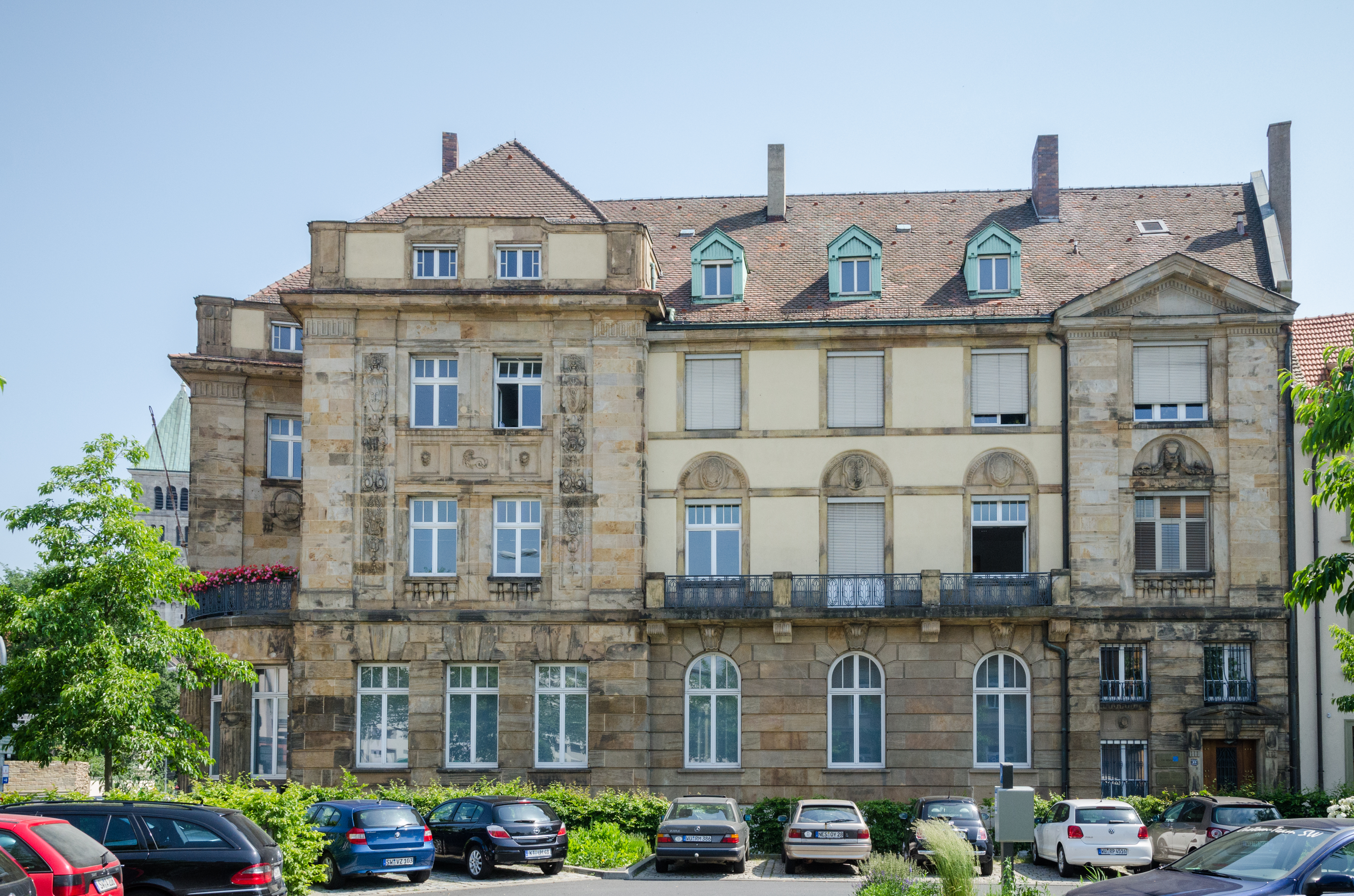 Schweinfurt, Schultesstraße 23